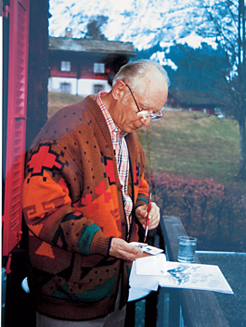 Der Künstler bei der Arbeit